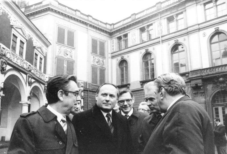 ADN-ZB/Häßler/15.11.85/Dresdens Lafontaine-Besuch Ein Spaziergang führte den Ministerpräsidenten des Saarlandes und Landesvorsitzenden der SPD Saar, Oskar Lafontaine (2.v.l.), u.a. über den restaurierten Stallhof des Dresdner Schlosses. Er wurde von Hans Modrow (2.v.r.), 1. Sekretär der Bezirksleitung der SED Dresden, Gerhard Schill (r.), Oberbürgermeister Dresdens, Herbert Weiz (l.), Stellvertreter des Vorsitzenden des Ministerrates und Minister für Wissenschaft und Technik sowie dem Leiter der Abteilung Internationale Politik und Wirtschaft im ZK der SED, Gunter Rettner (M.), begleitet.